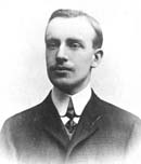 Karel Schinzel (1886 - 1951), Inženýr, chemik a vynálezce.